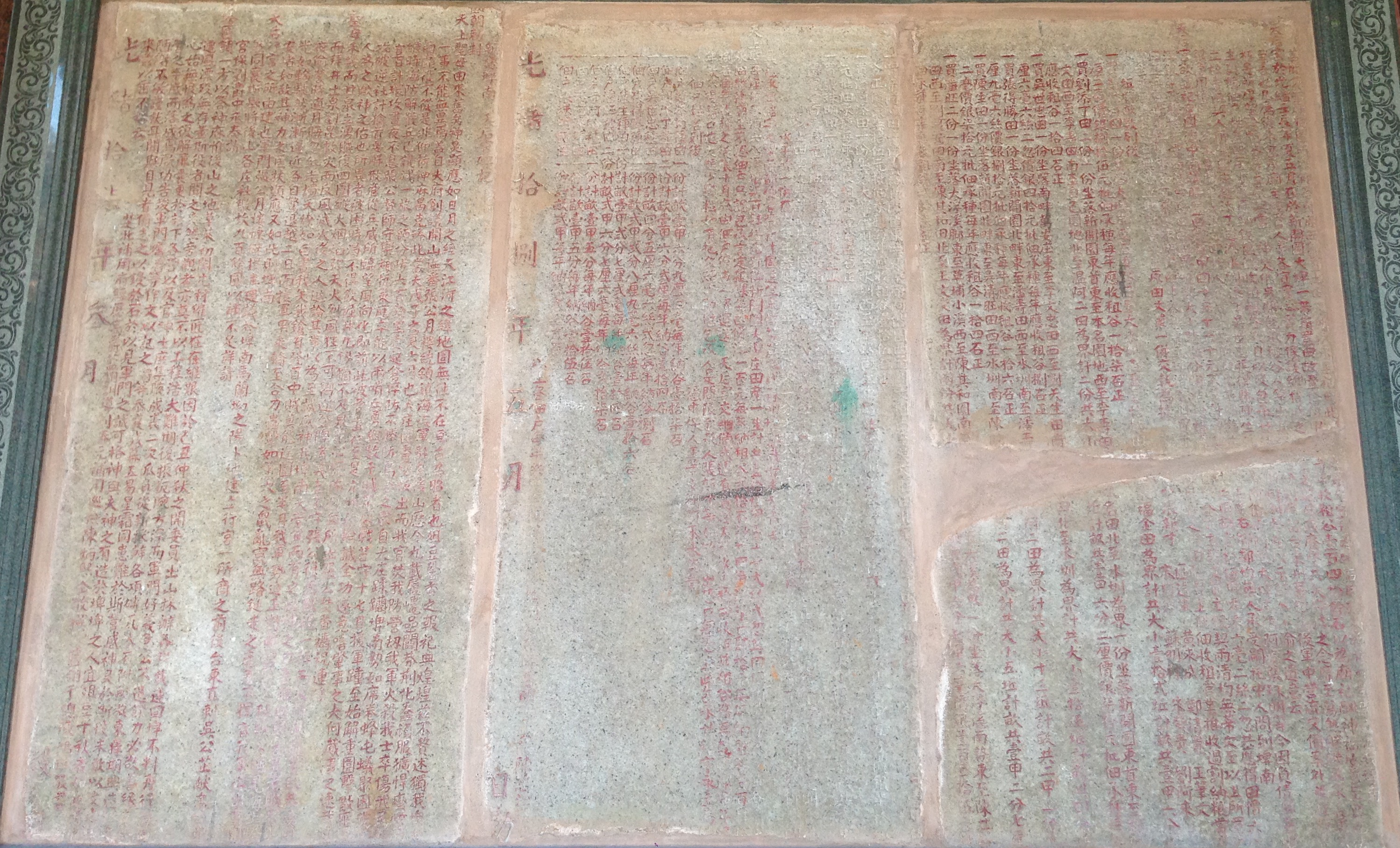 中文（台灣）: 埤南天后宮碑記1